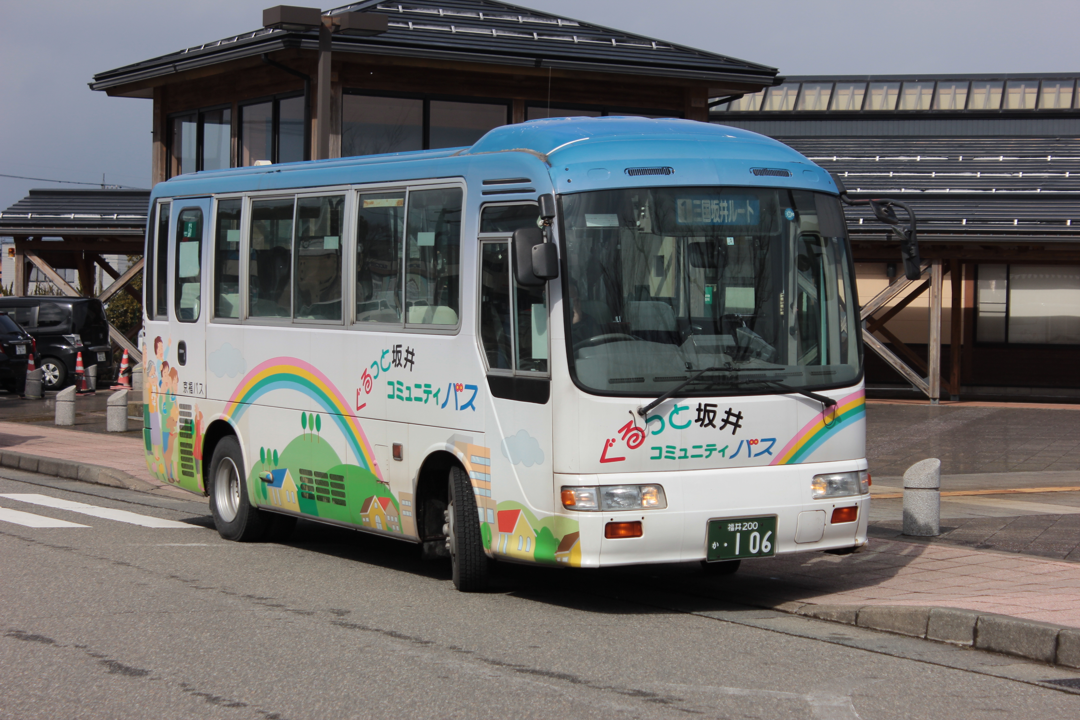 福井県坂井市のコミュニティバス「ぐるっと坂井」。三国坂井ルートの右回りで使用される。 Canon EOS Kiss X5